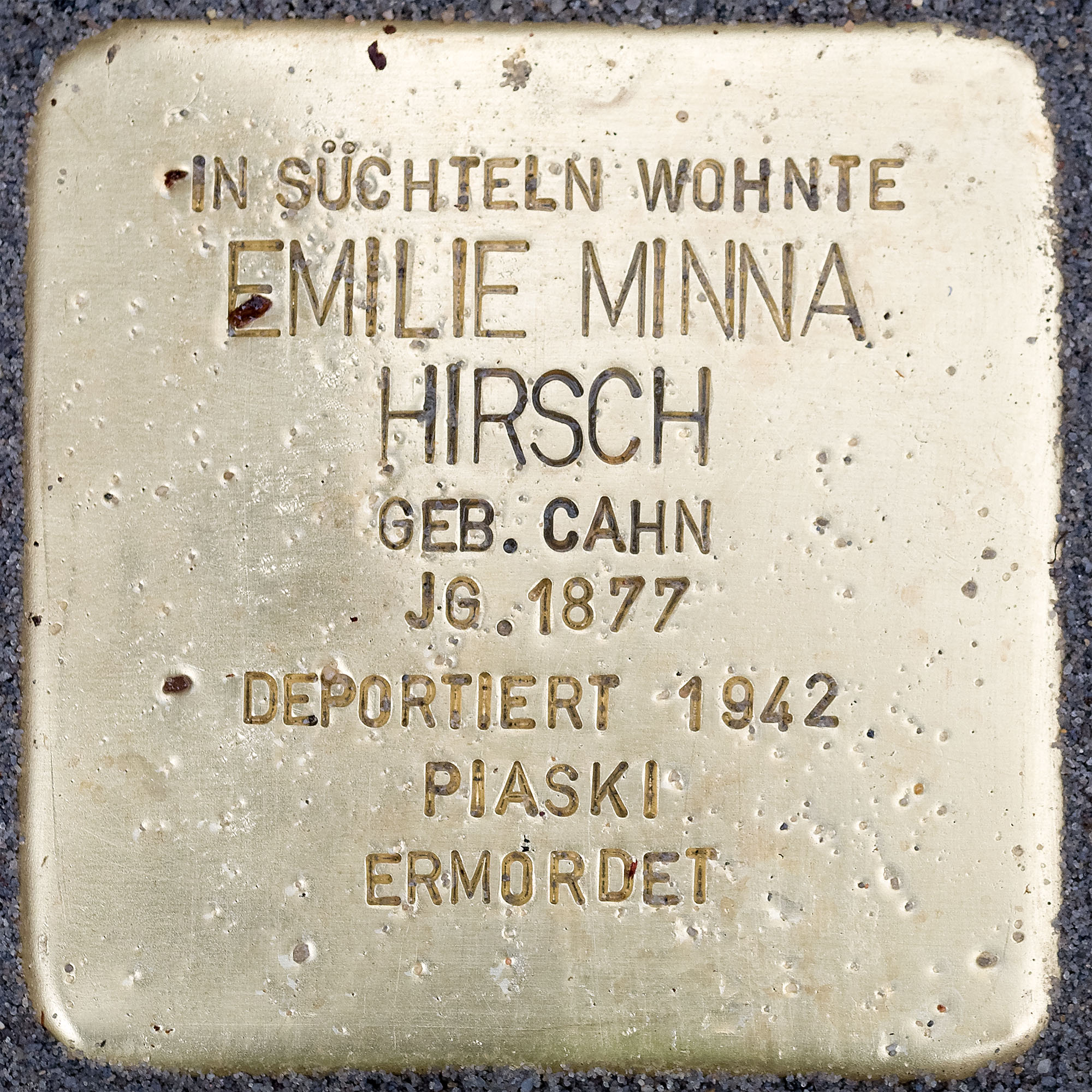 Stolpersteine Suechteln: Hirsch, Emilie Minna